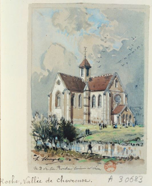 Notre Dame de la Roche à Levis-Saint-Nom Dessin à la mine de plomb, aquarelle et gouache sur papier gris ; 12,5 x 8,8 cm de Hubert Clerget